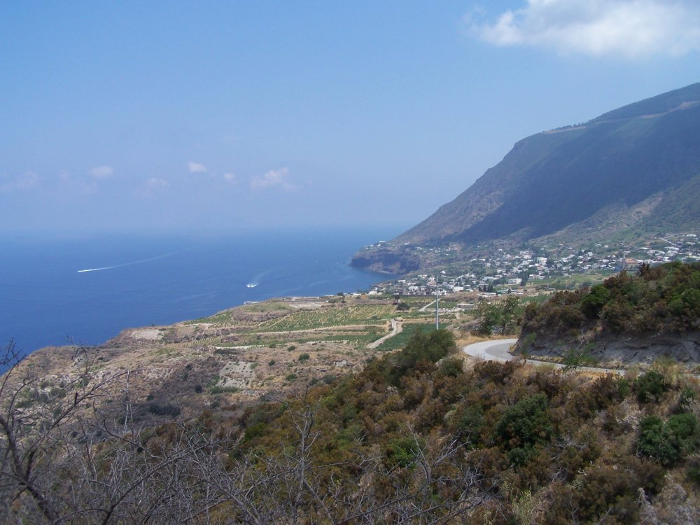 Malfa on Salina, Italy